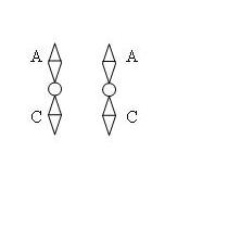 Homosügoot